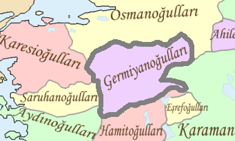 Germiyanoğulları Beyliği'nin konumu